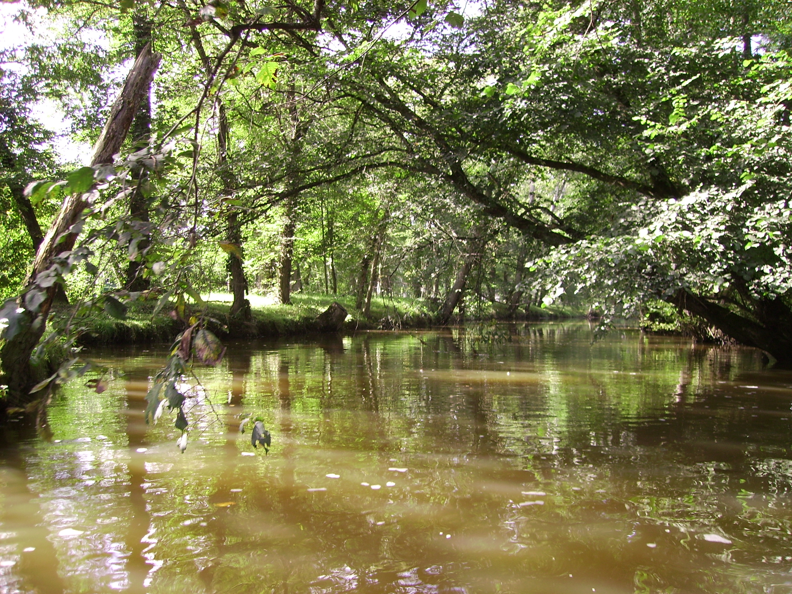 Vue de l'Aumance à bord d'un kayak.